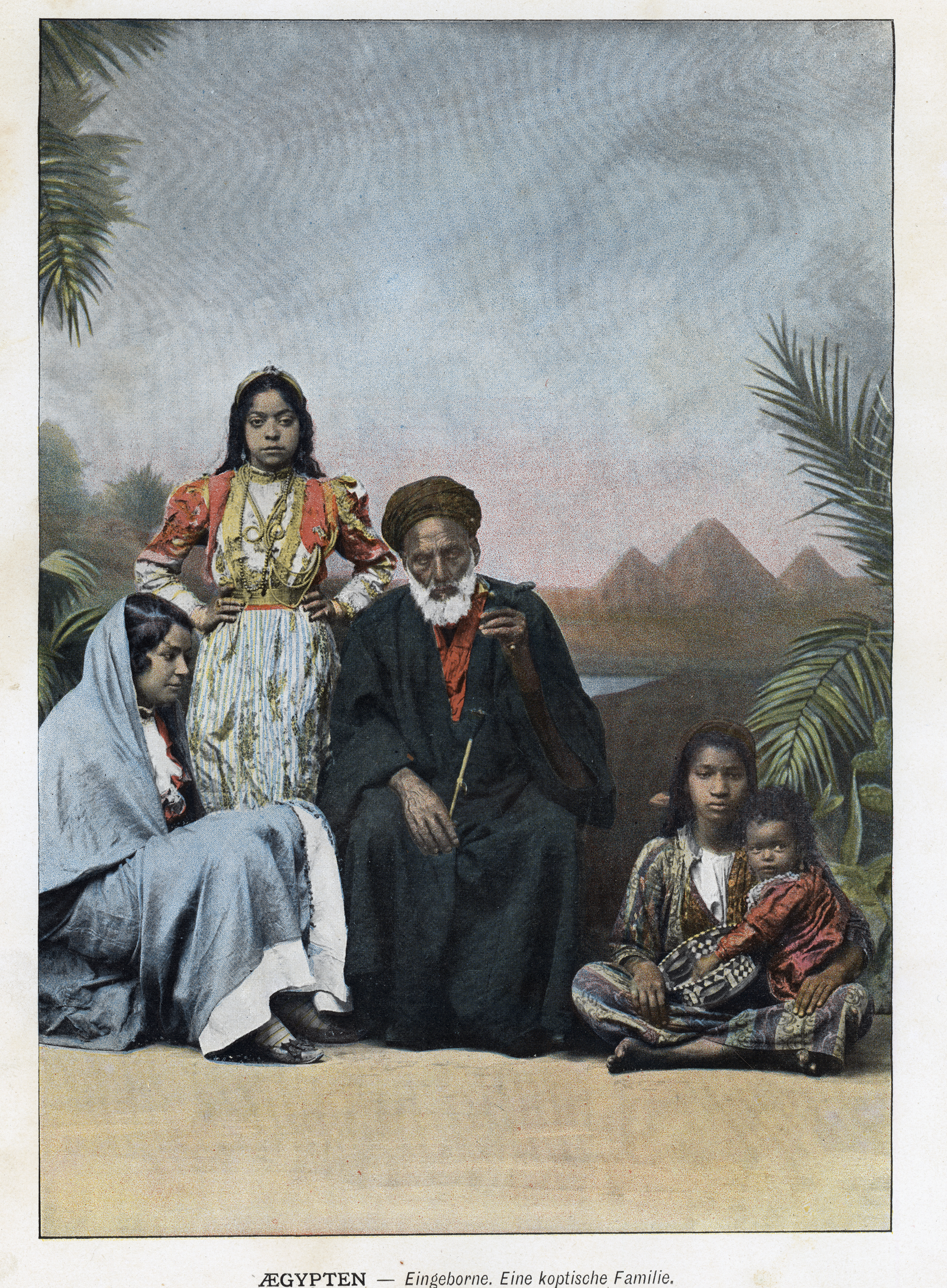 Une famille Coptes au XIXème siècle